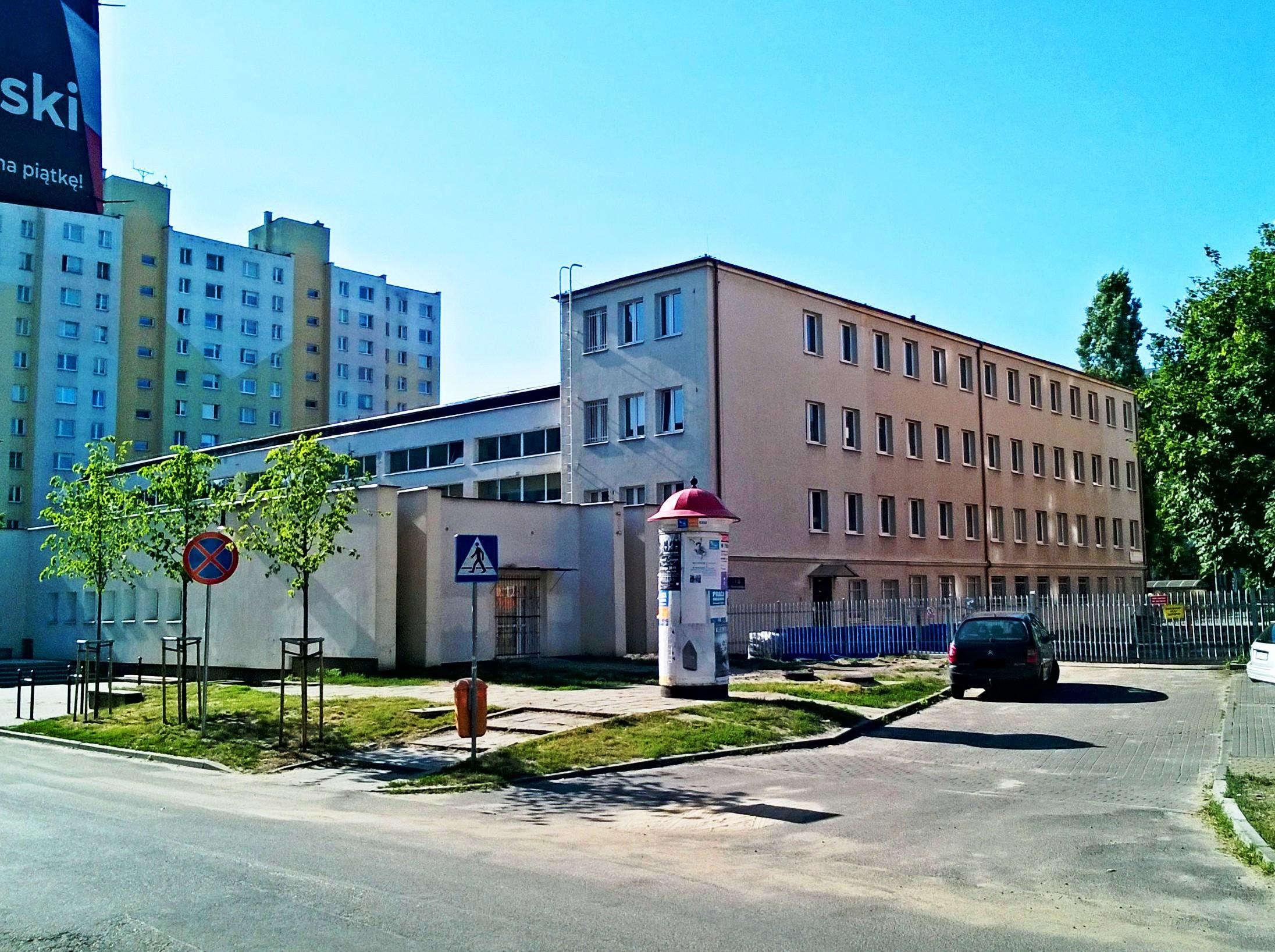 Hala Olimpijczyk w Toruniu